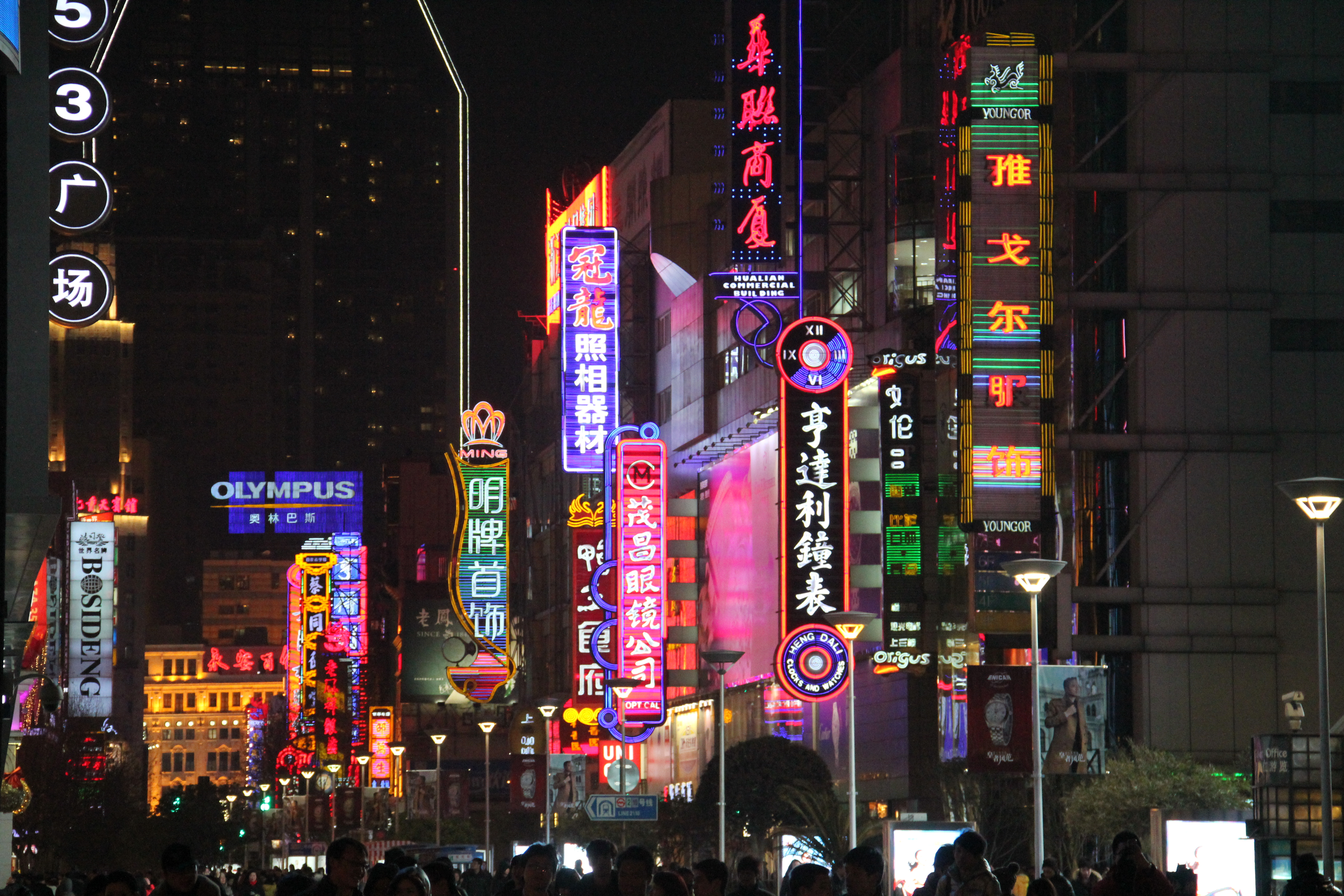 Nanjing Lu